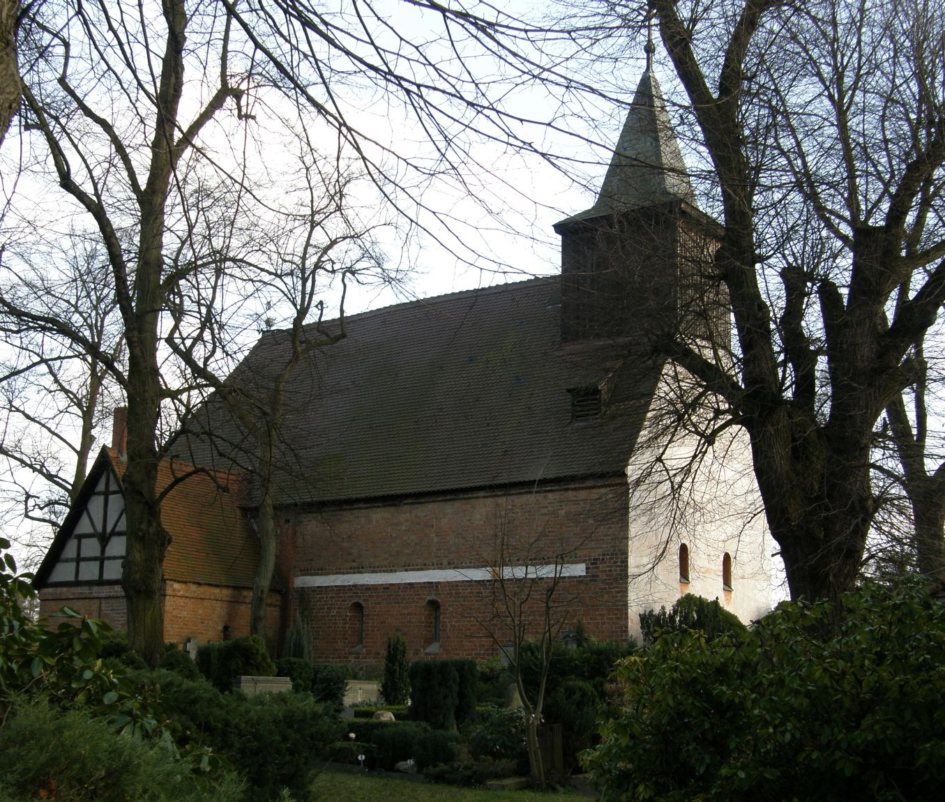 St.-Annen-Kirche (Dorfkirche Dahlem) mit dem umgebenden St.-Annen-Kirchhof